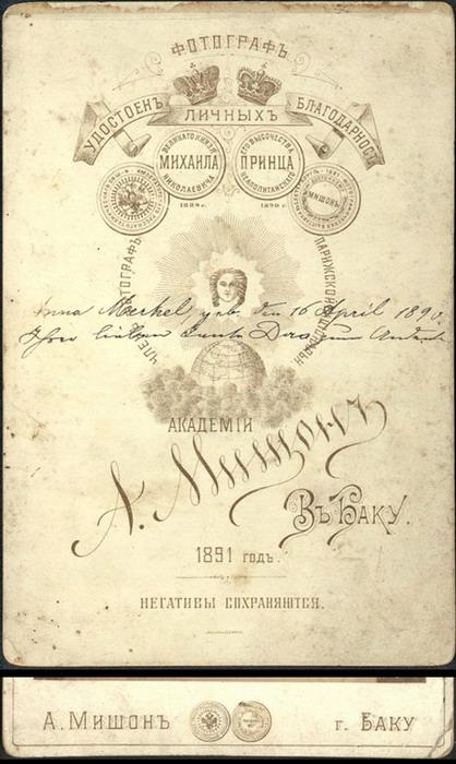 Оборотная сторона фотографии - Александр Мишон-1891 в городе Баку.